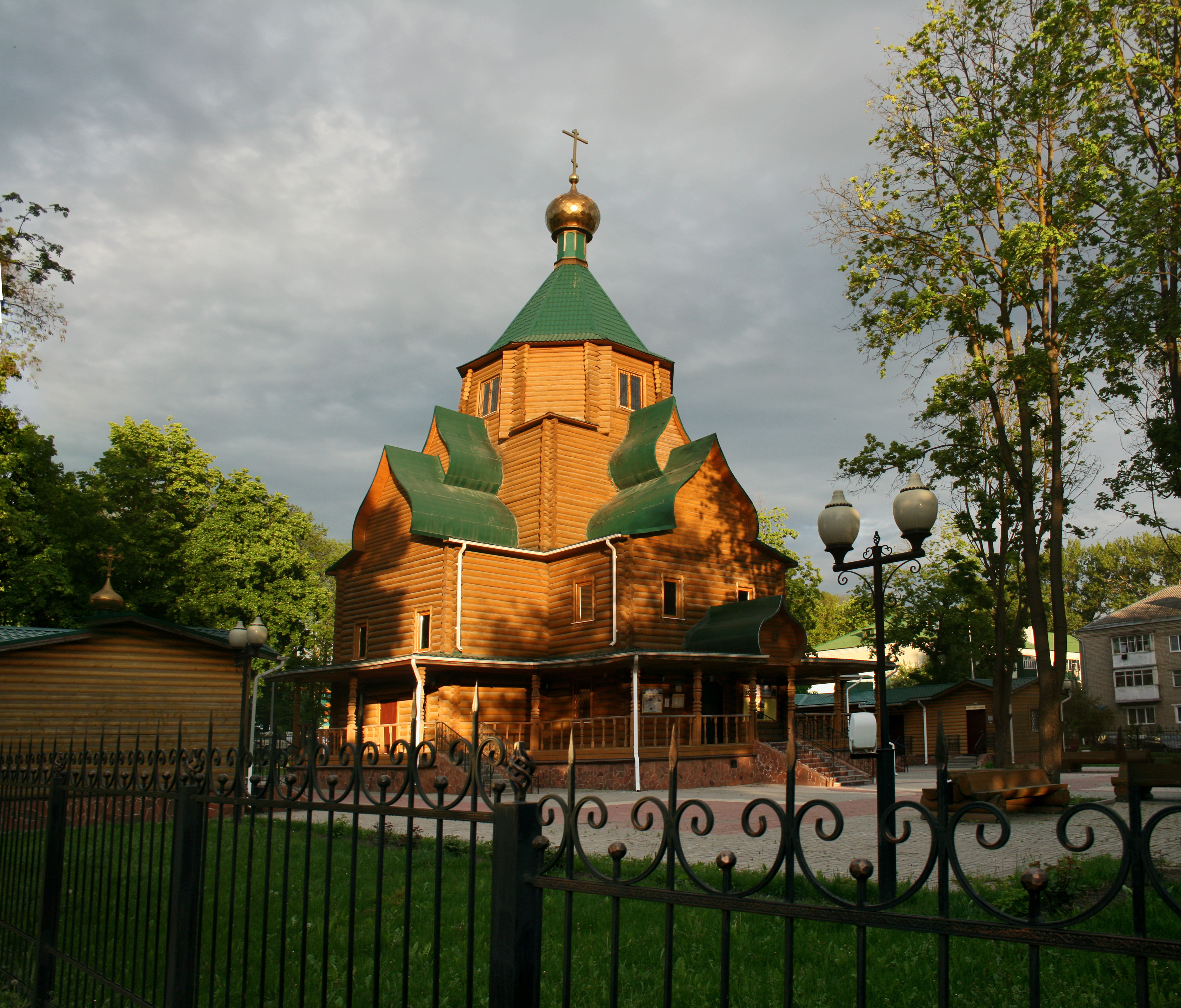 Церковь Иоанна Кронштадтского. Белгород